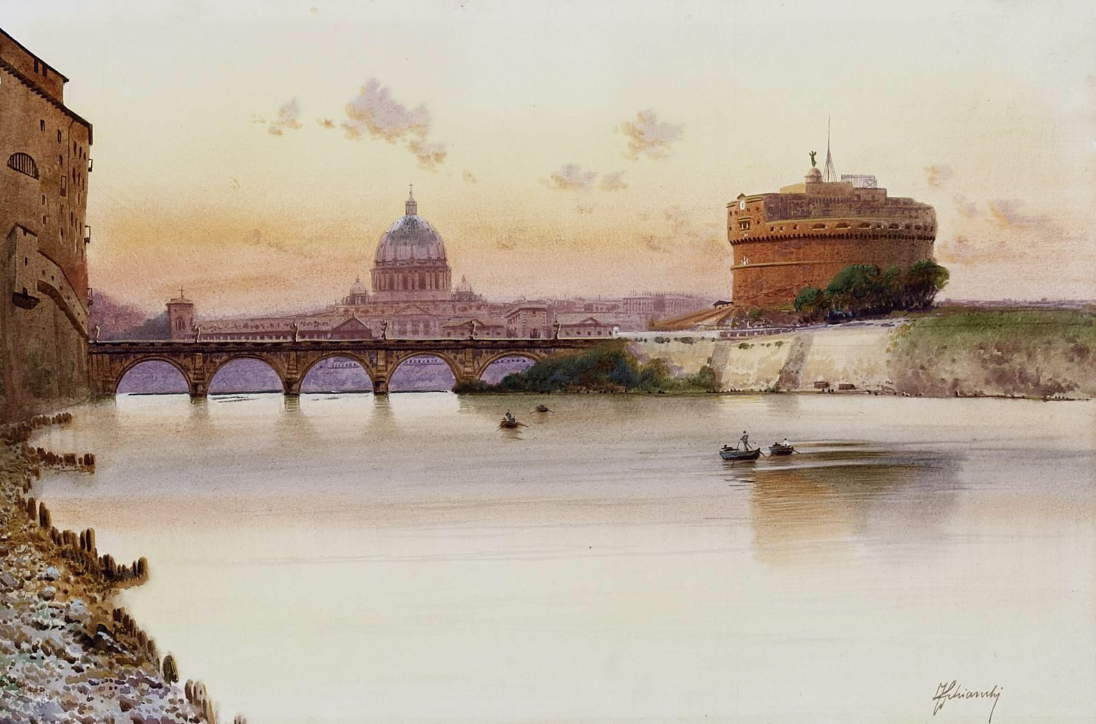 Der Tiber bei Castel S. Angelo, Rom.